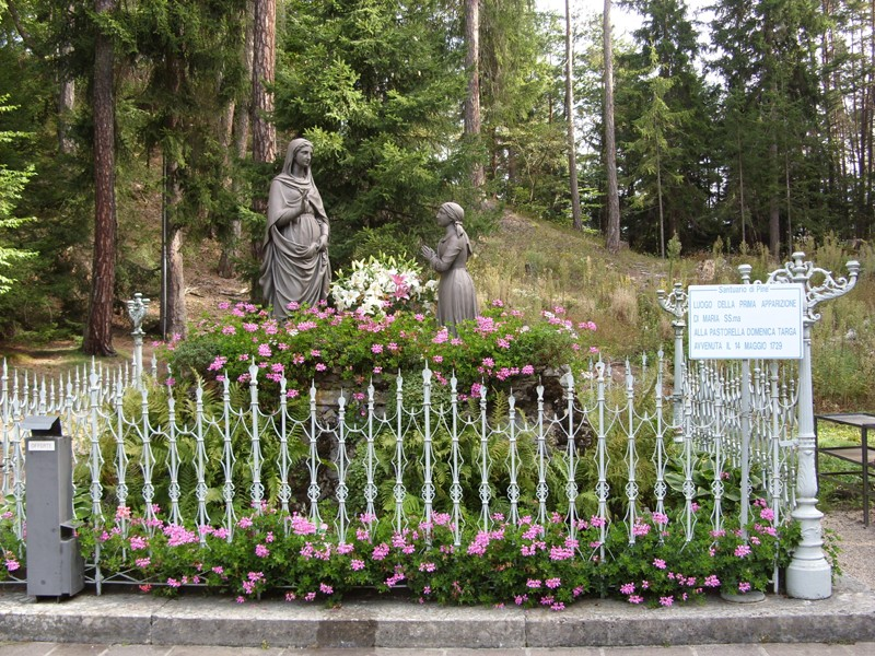 Montagnaga - Monumento dell'Apparizione della Madonna di Piné